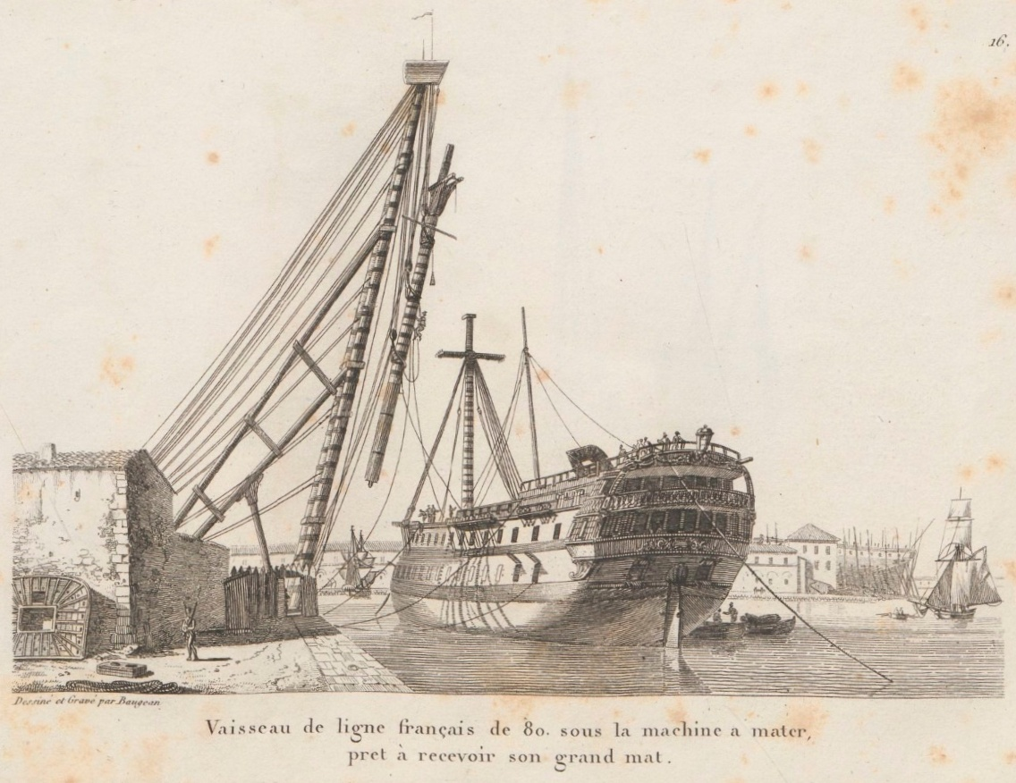 Gravure publiée en 1826 dans la Collection de toutes les espèces de bâtiments de guerre et de bâtiments marchands qui naviguent sur l'Océan et dans la Méditerranée, dessinée d'après nature et gravée par Baugean mais réalisée avant 1819 (date de la mort de l'auteur).